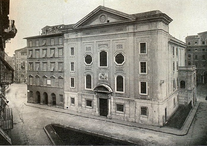 L'antica sinagoga di Livorno, distrutta dai bombardamenti nel 1944